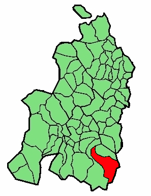 aipaturiko udalerriaren kokapena Nafarroa Beherean